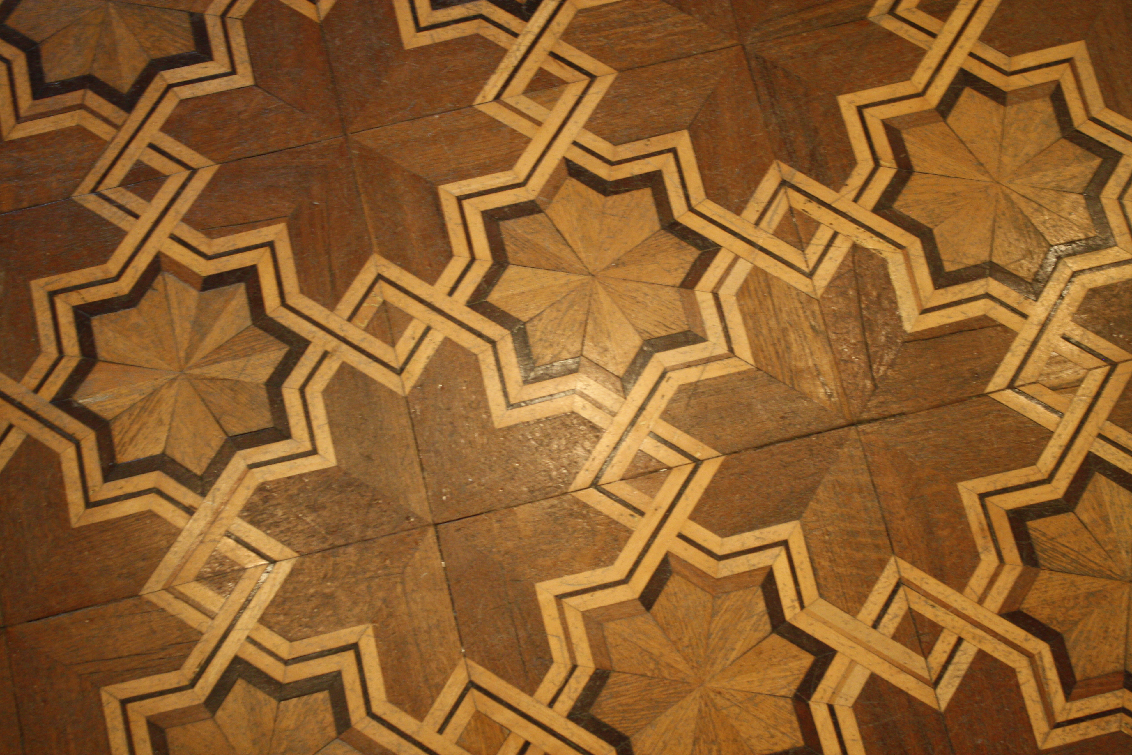 Villa Bernasconi a Cernobbio. This is a photo of a monument which is part of cultural heritage of Italy.